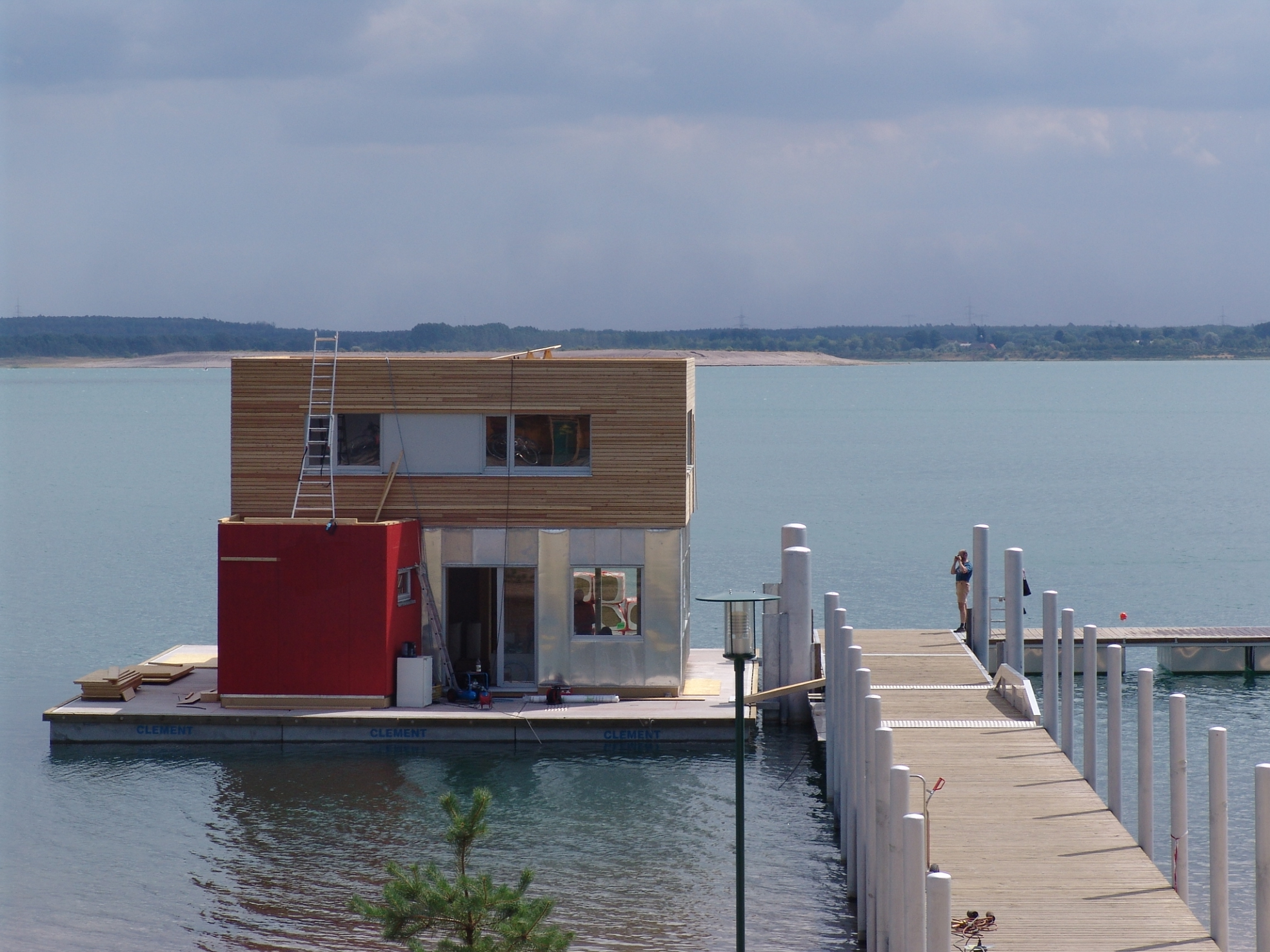 Das erste schwimmende Haus am Gräbendorfer See